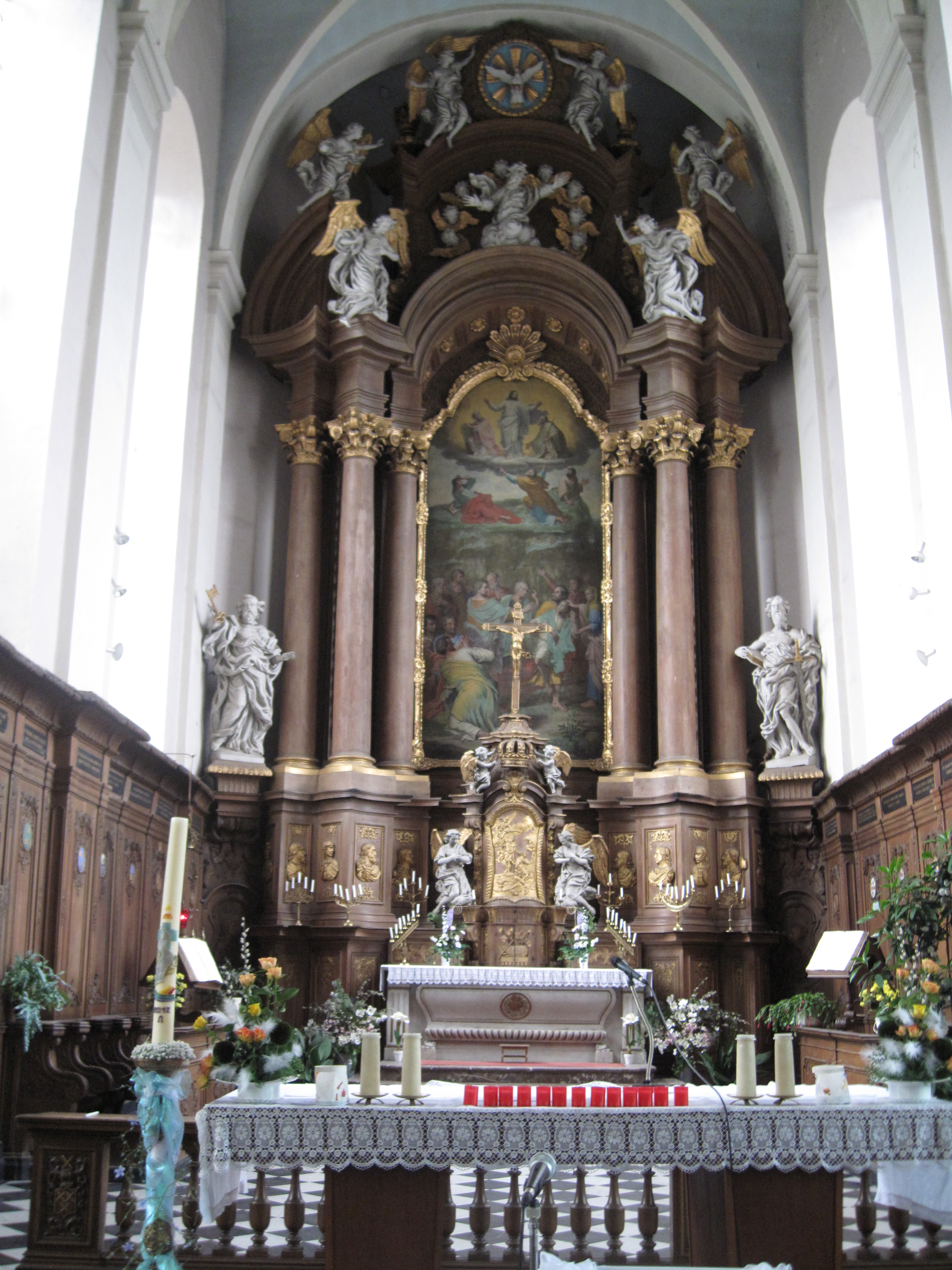 Vue sur l'Autel de l'Eglise Saint-Roch à Soiron